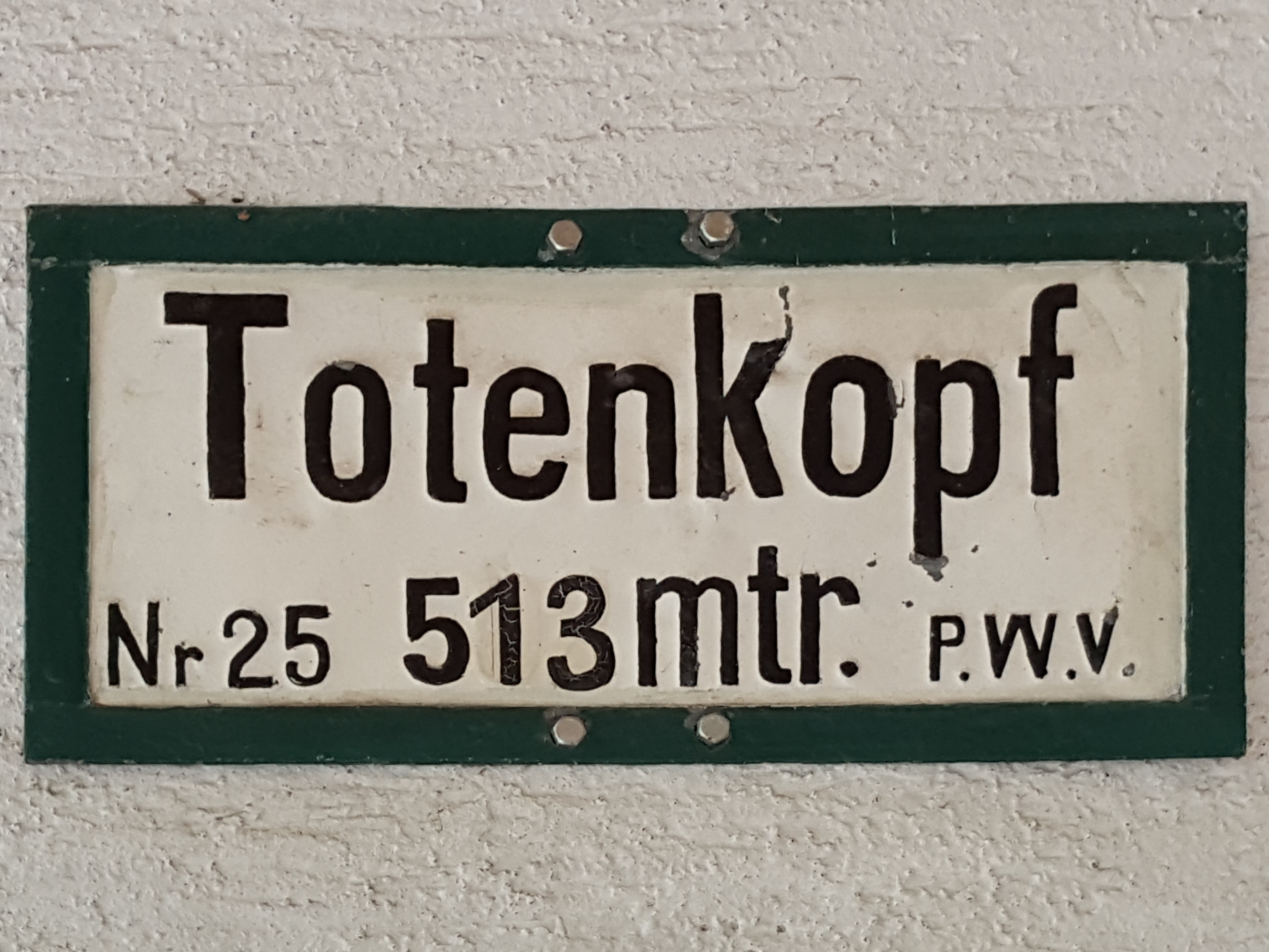 Totenkopf im Pfälzerwald - Markierung